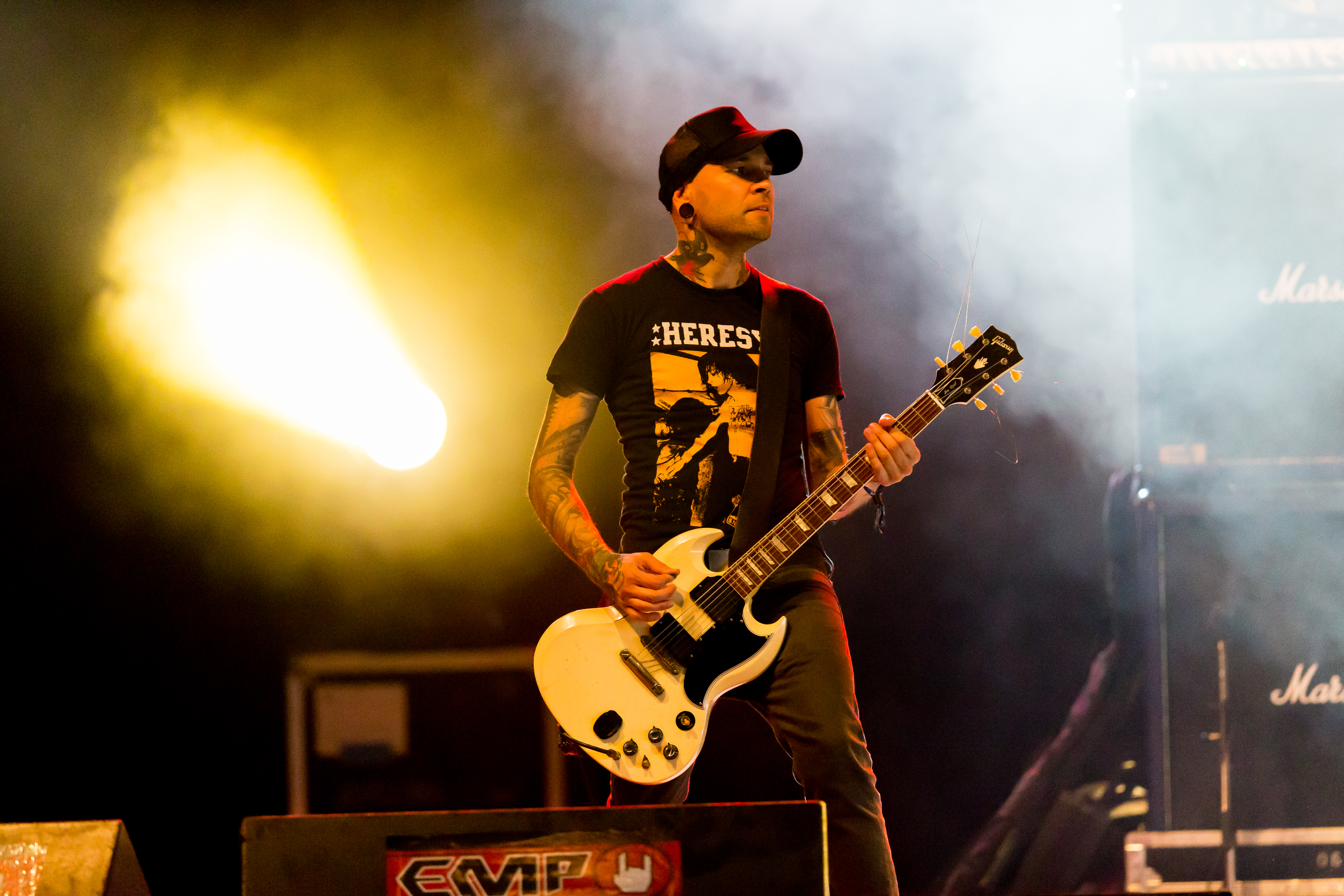 Rotten Sound during Summer Breeze 2016 at , Dinkelsbühl, Bayern, Germany on 2016-08-20, Photo: Sven Mandel